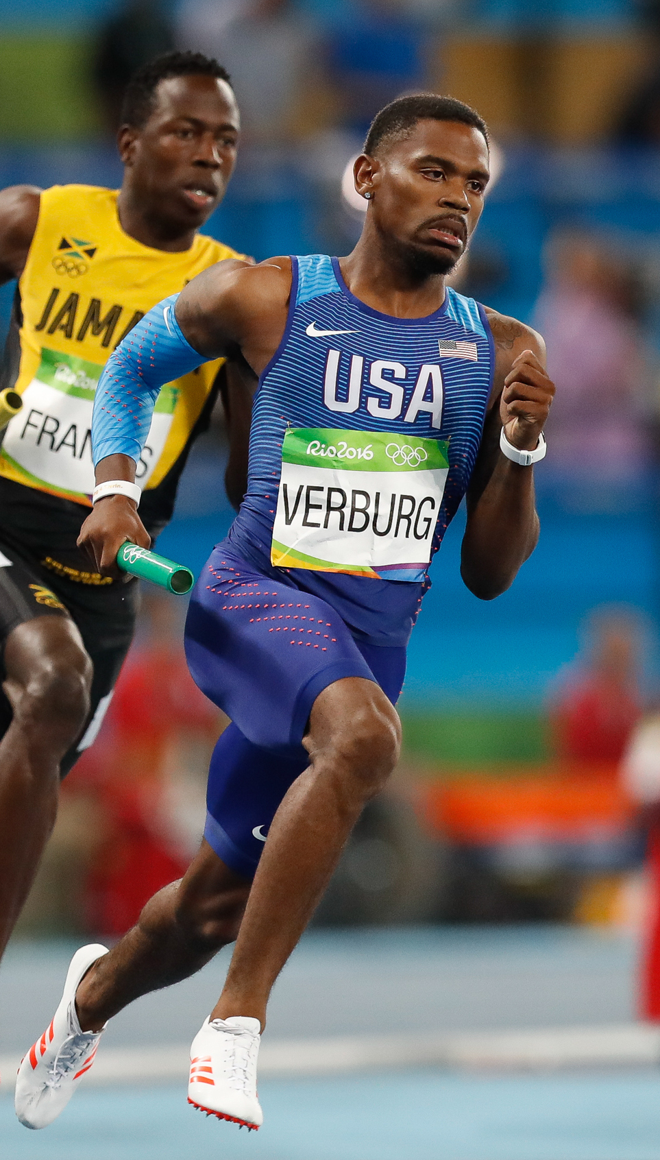 Rio de Janeiro - Eliminatórias do revezamento 4 x 400m nos Jogos Rio 2016, no Estádio Olímpico (Fernando Frazão/Agência Brasil)